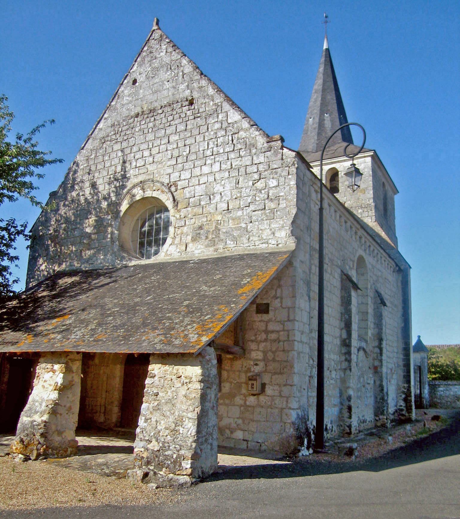 Église Saint-Maurice de Chartrené, porche, 12ème 17ème 18ème siècles.